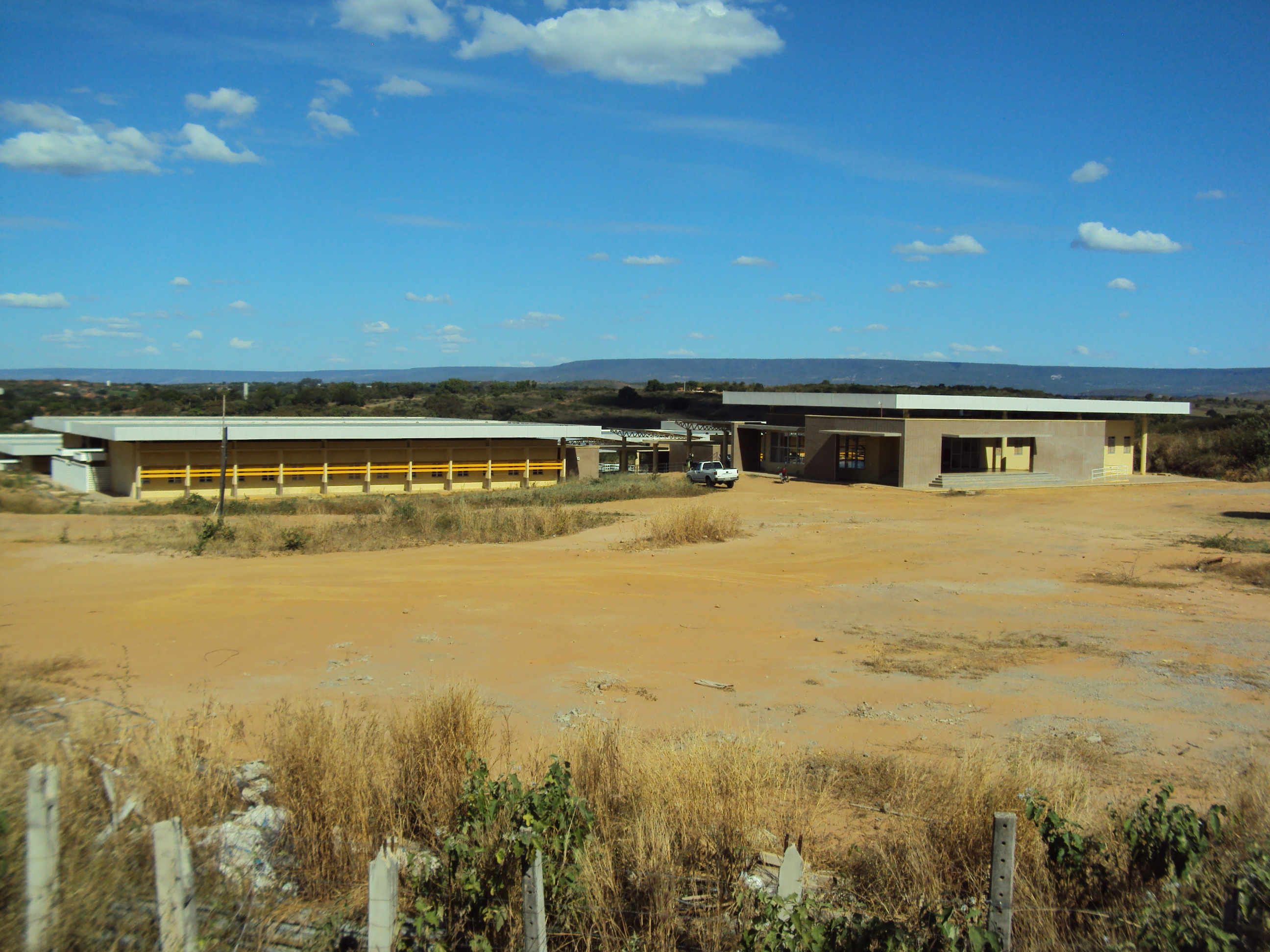 Arquivo de livre acesso